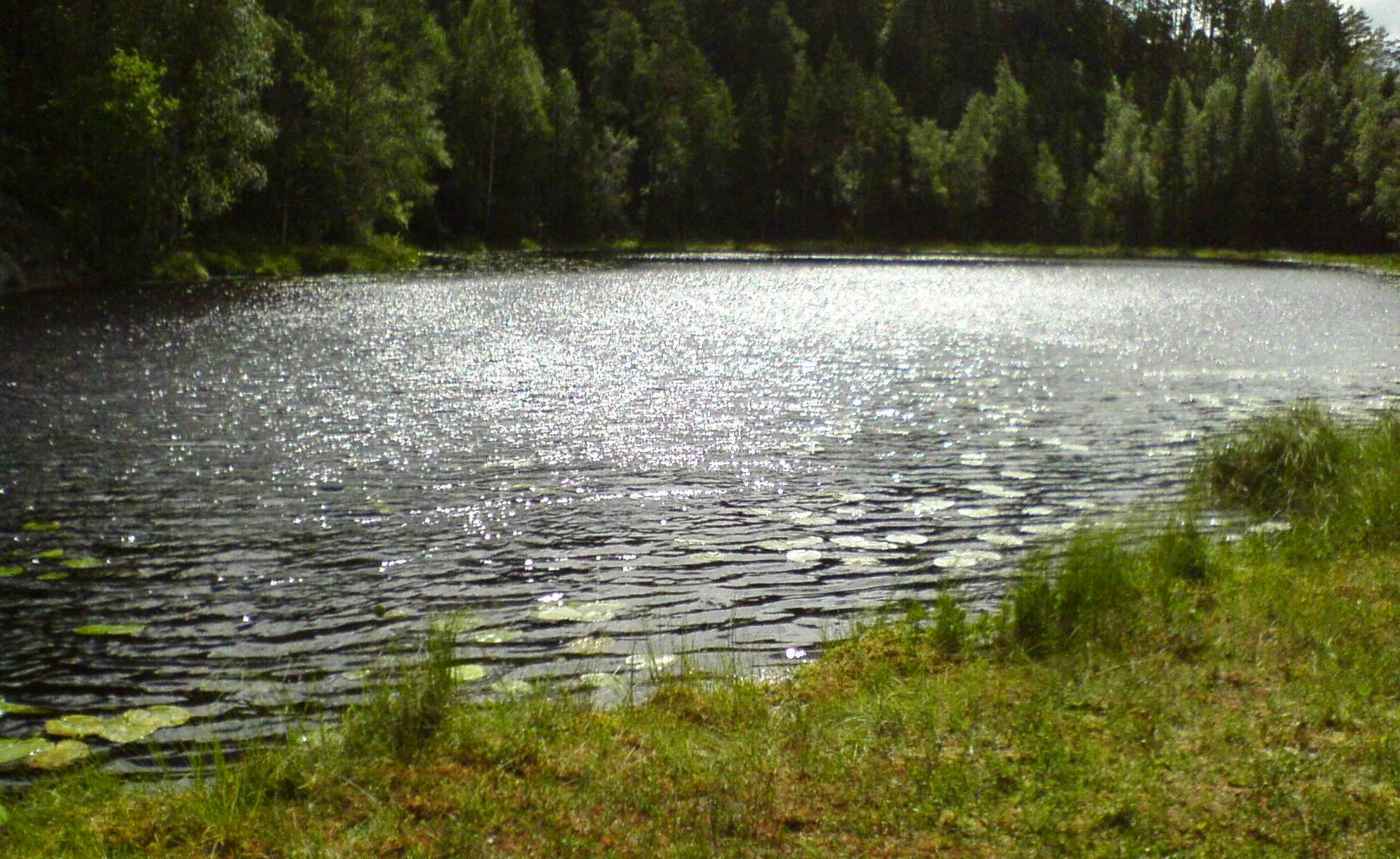 Store Liertjern i Aurskog-Høland kommune